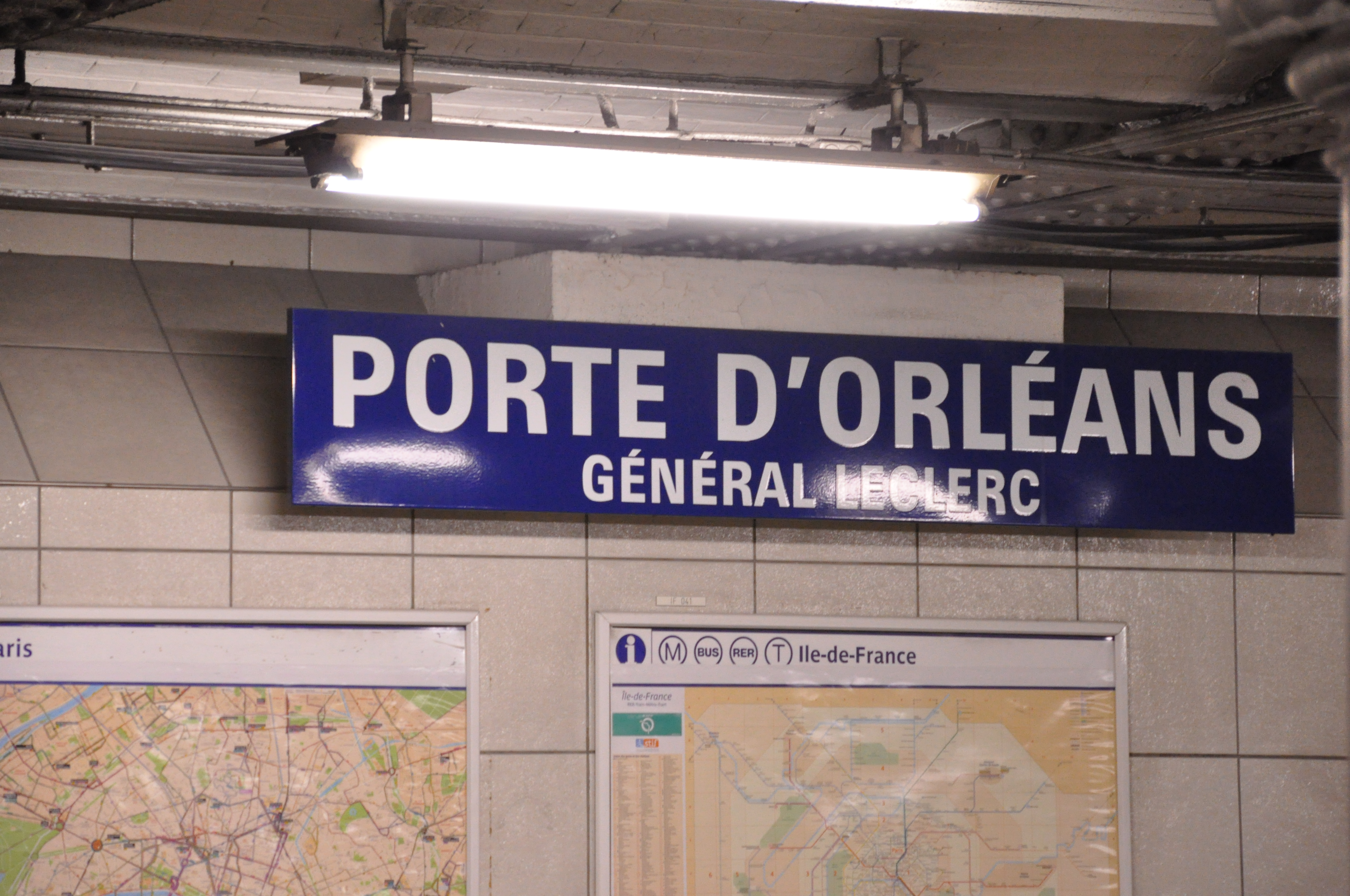 Vue d'un panneau indiquant le nom de station sur la ligne 4 du métro de Paris.